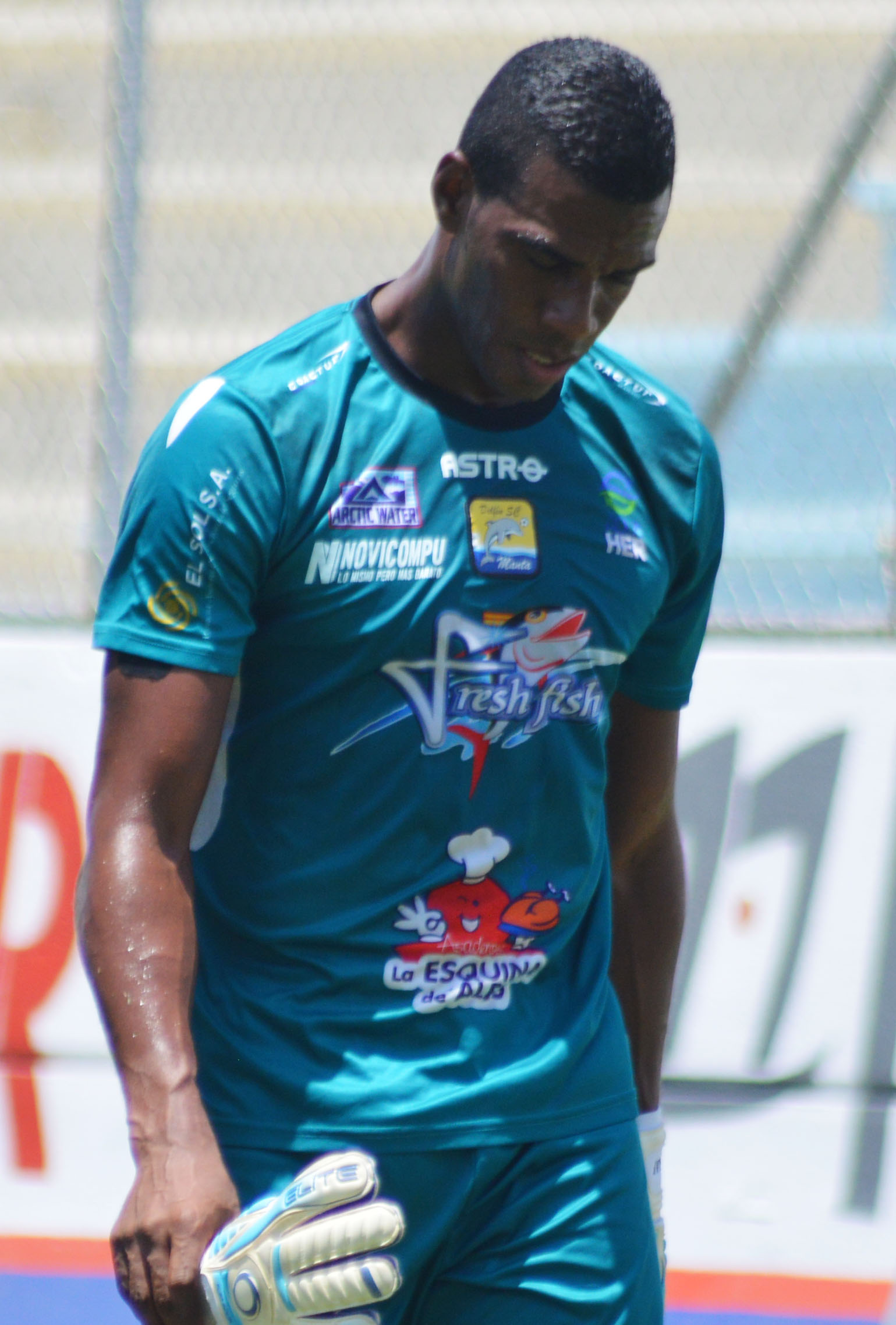 Rolando Ramírez en Delfín de Manta 2015